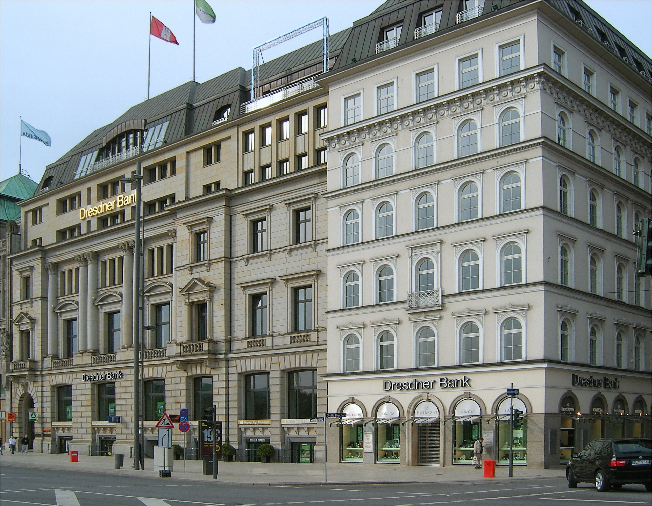 Das Haus Jungfernstieg 22 in der Hamburger Neustadt wurde zwischen 1896 und 1899 von Martin Haller für die Dresdner Bank erbaut. Hinter der Neorenaissancefassade liegt ein zweigeschossiger Arkadenhof, der als Schalterhalle dient. Das daneben liegende Haus Jungfernstieg 25 mit seiner Putzfassade ist nach dem Hamburger Brand von 1842 durch Hermann Peter Fersenfeldt errichtet worden.